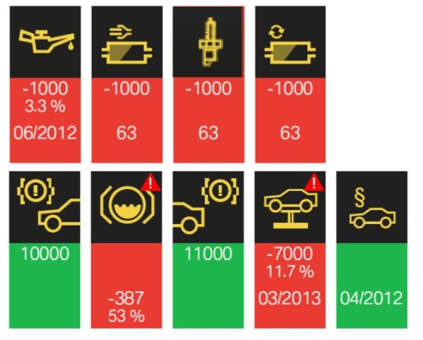 Informationen, die aus einem Kfz-Schlüssel eines Pkw mit CBS auslesbar sind.